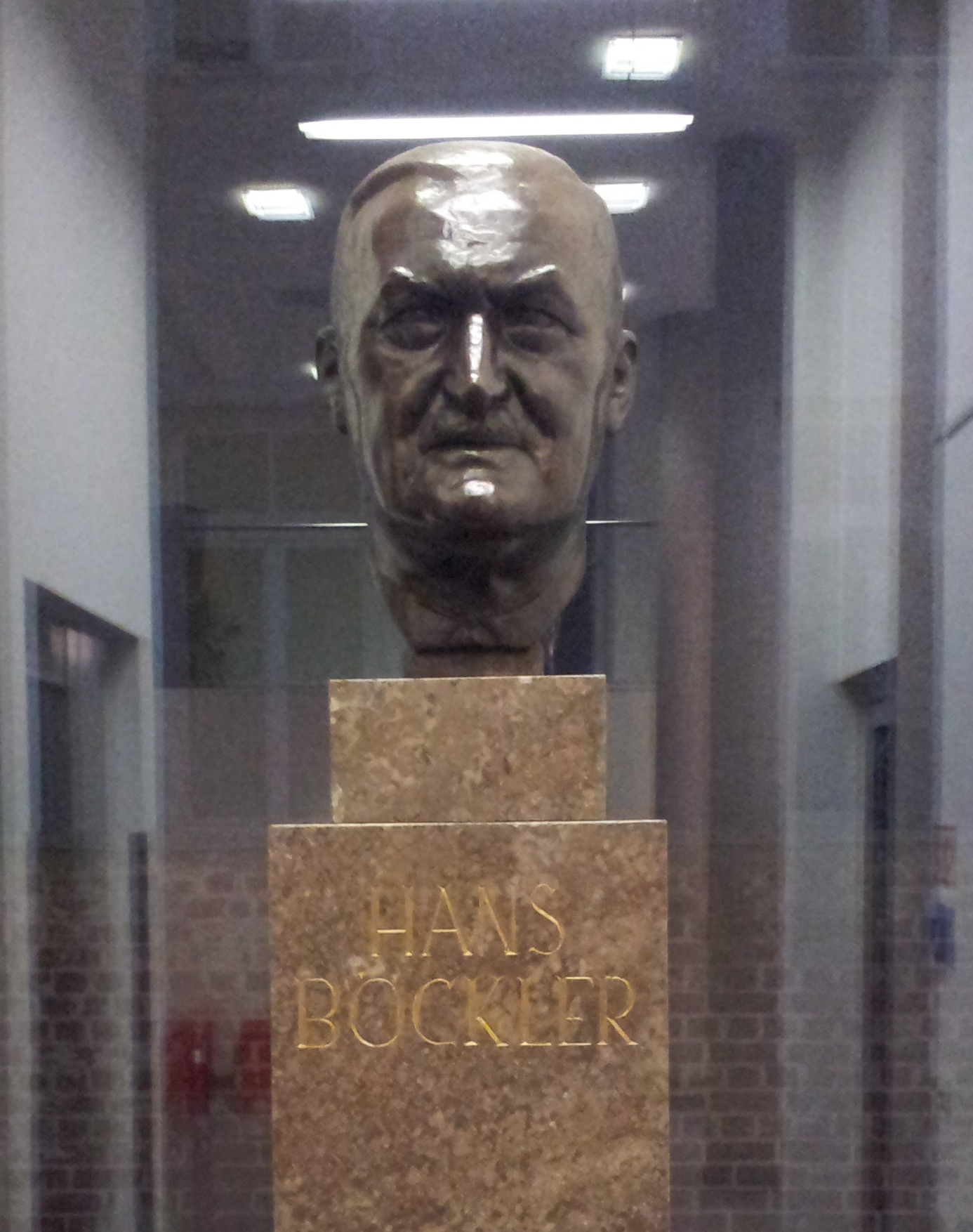 Porträtstele von Hans Böckler im Münchner Gewerkschaftshaus. Karl Trumpf (1891-1959) - Bronze